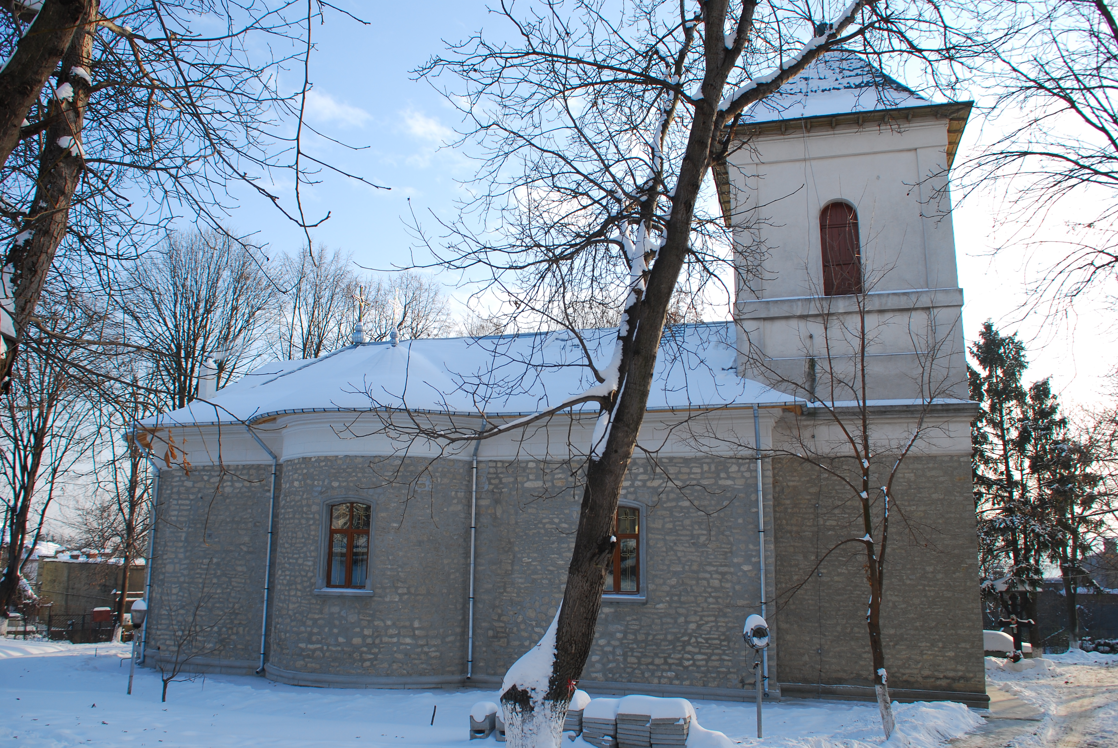 Biserica "Sf. Apostol Toma și Sf. Ecaterina" 01